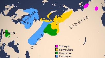 répartition des langues ouraliennes